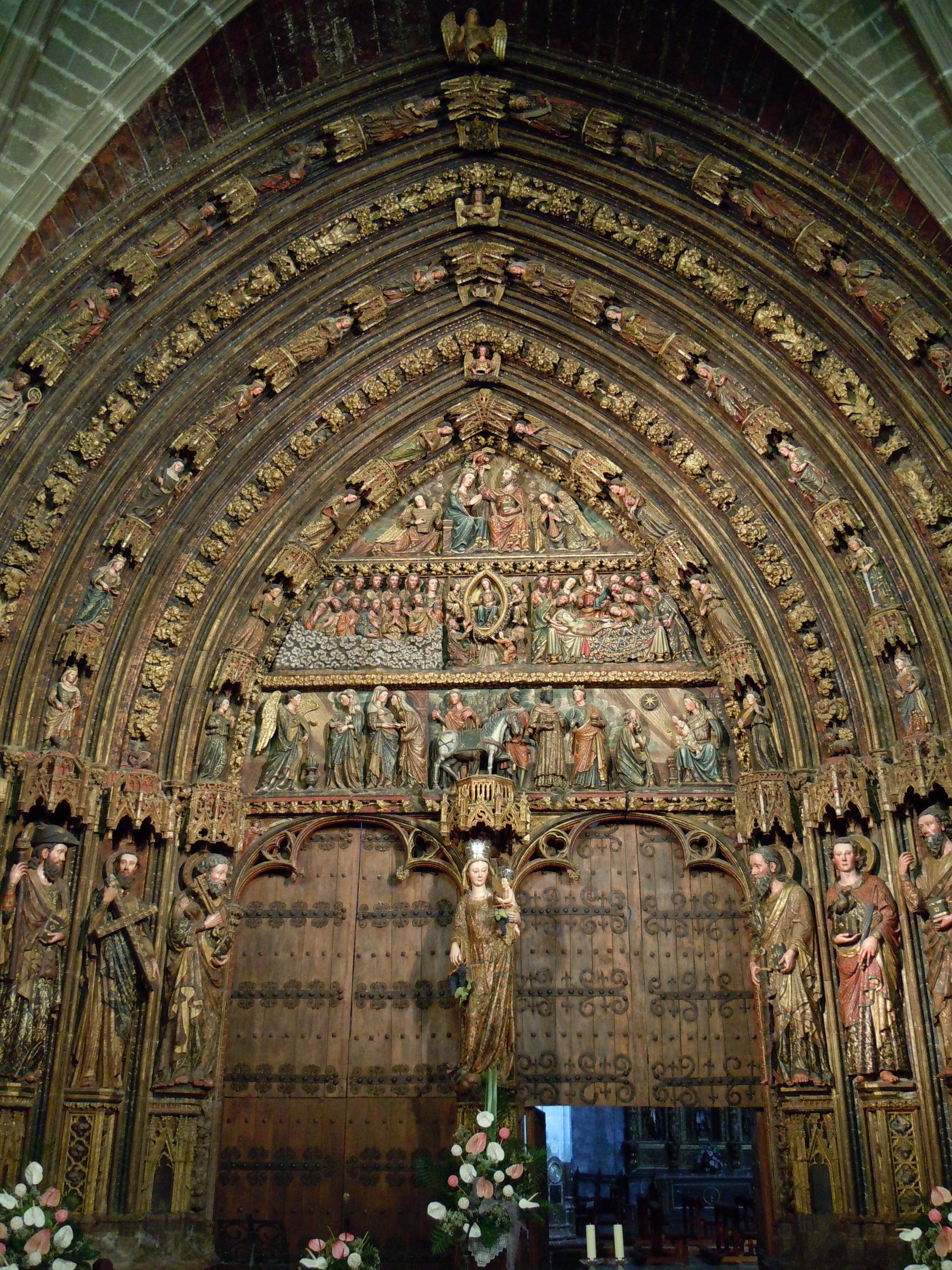 Iglesia de Santa María de los Reyes, Laguardia, Álava (Spain).